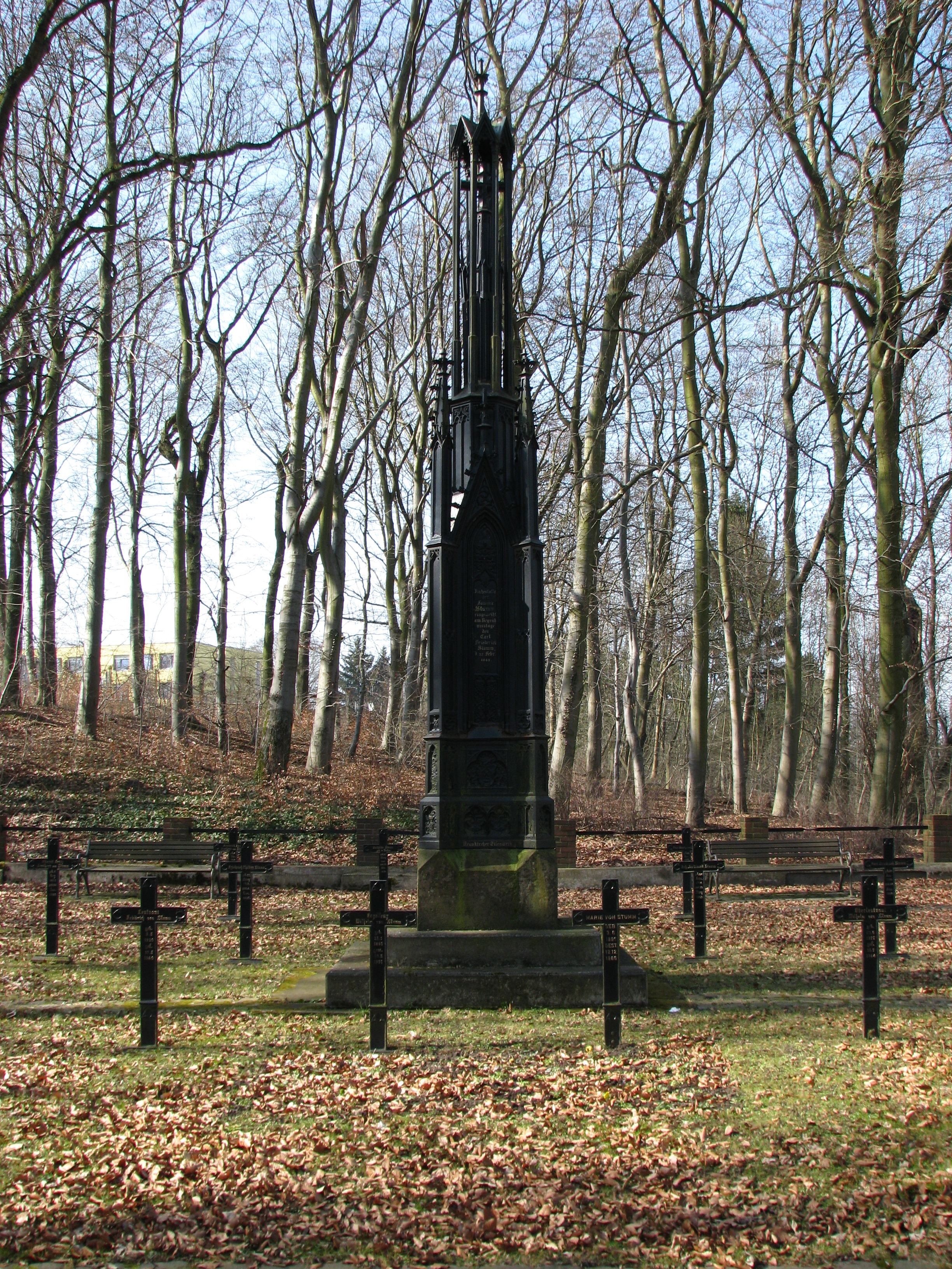 Erbbegräbnisstätte Familie Stumm in Neunkirchen (Saar)